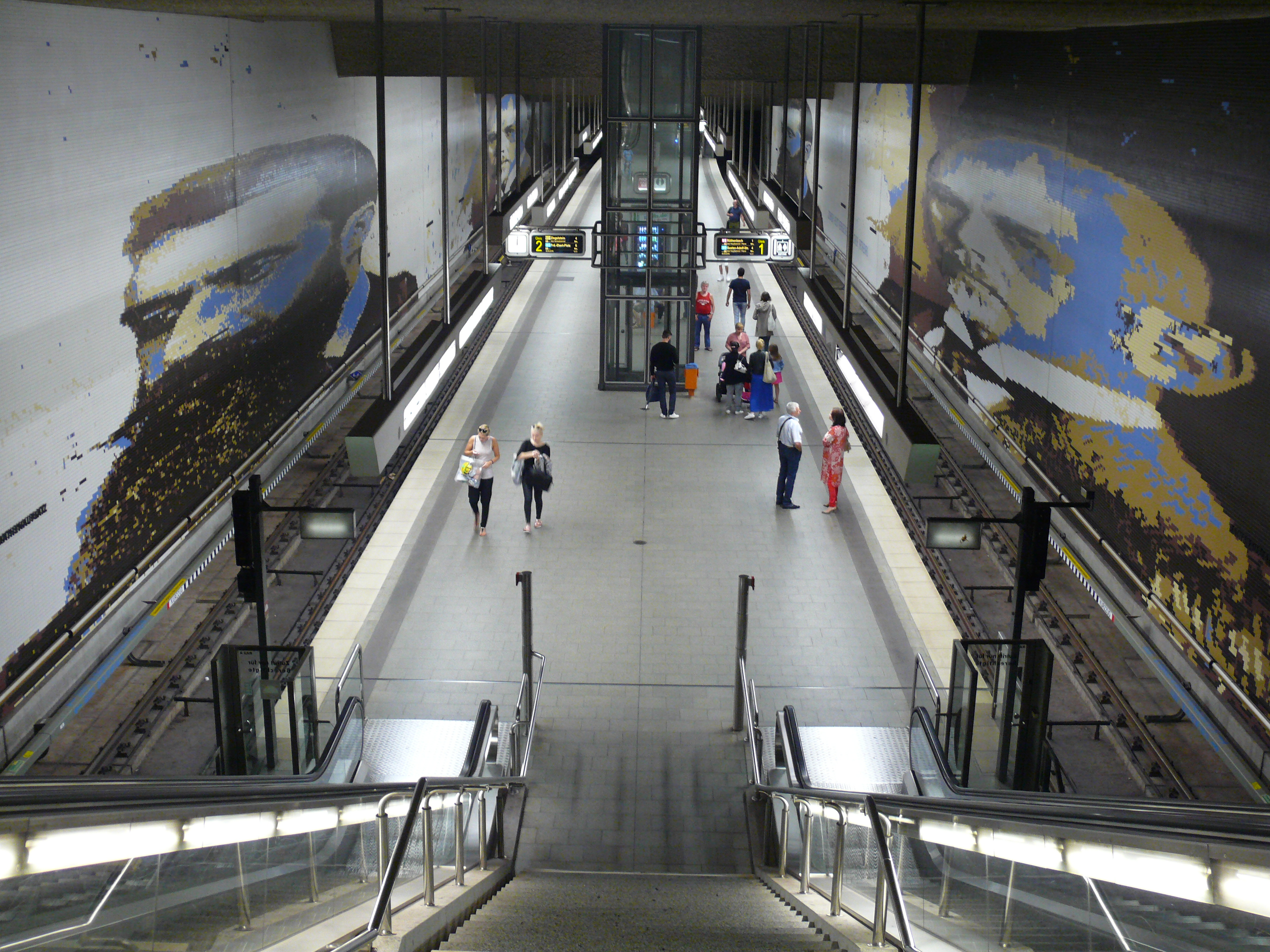 Blick auf die Bahnsteigebene am U-Bahnhof Rathenauplatz in Nürnberg. Künstlerische Gestaltung des Großmosaiks 1990 von Gregor Hiltner (zeigt links Theodor Herzl, rechts Walther Rathenau)